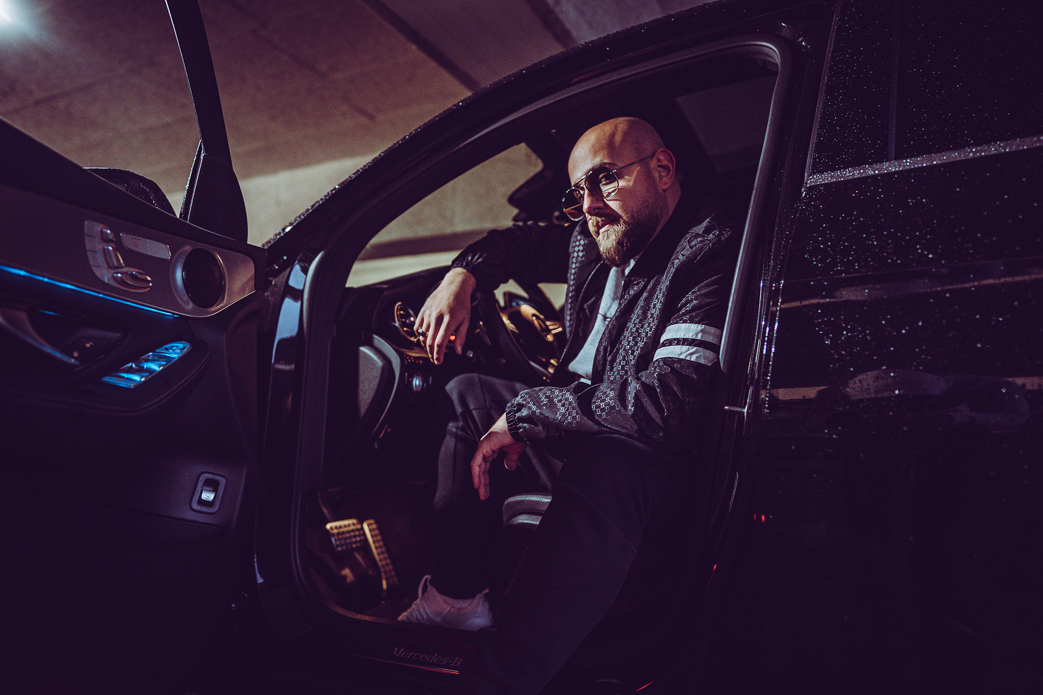 Pressefoto des Rappers EZY